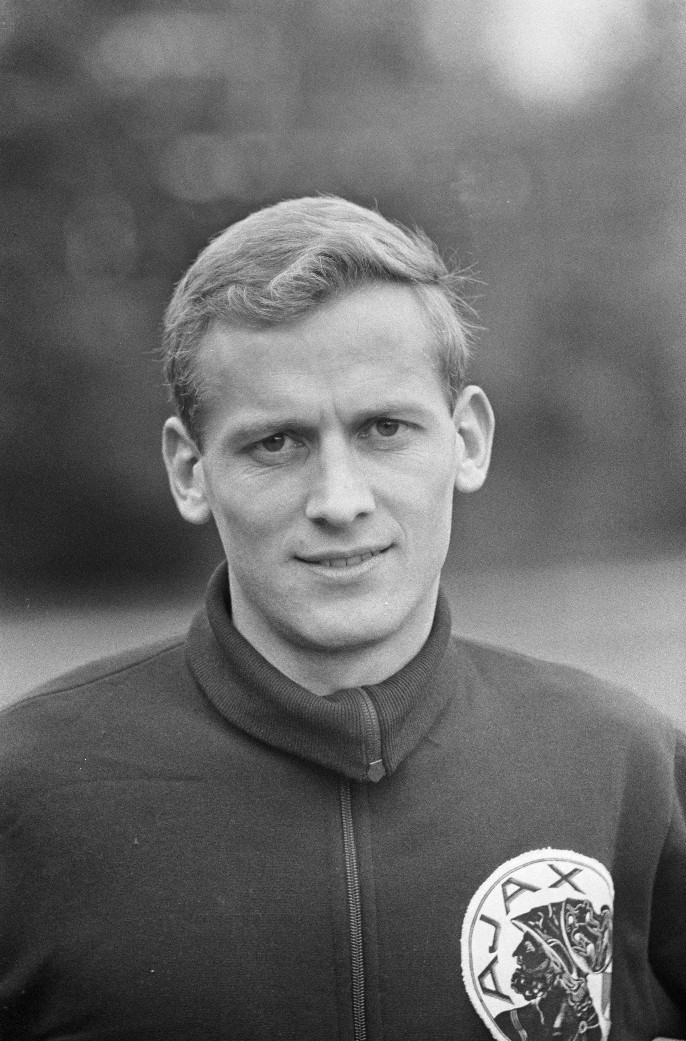 Collectie / Archief : Fotocollectie Anefo Reportage / Serie : Voetbalwedstrijd Go Ahead - Ajax te Deventer: 2-3 Beschrijving : Portret van Ajax speler Klaas Nuninga Datum : 30 oktober 1966 Locatie : Deventer, Overijssel Trefwoorden : portretten, sport, voetbal Instellingsnaam : Go Ahead Fotograaf : Fotograaf Onbekend / Anefo Auteursrechthebbende : Nationaal Archief Materiaalsoort : Negatief (zwart/wit) Nummer archiefinventaris : bekijk toegang 2.24.01.05 Bestanddeelnummer : 919-7378